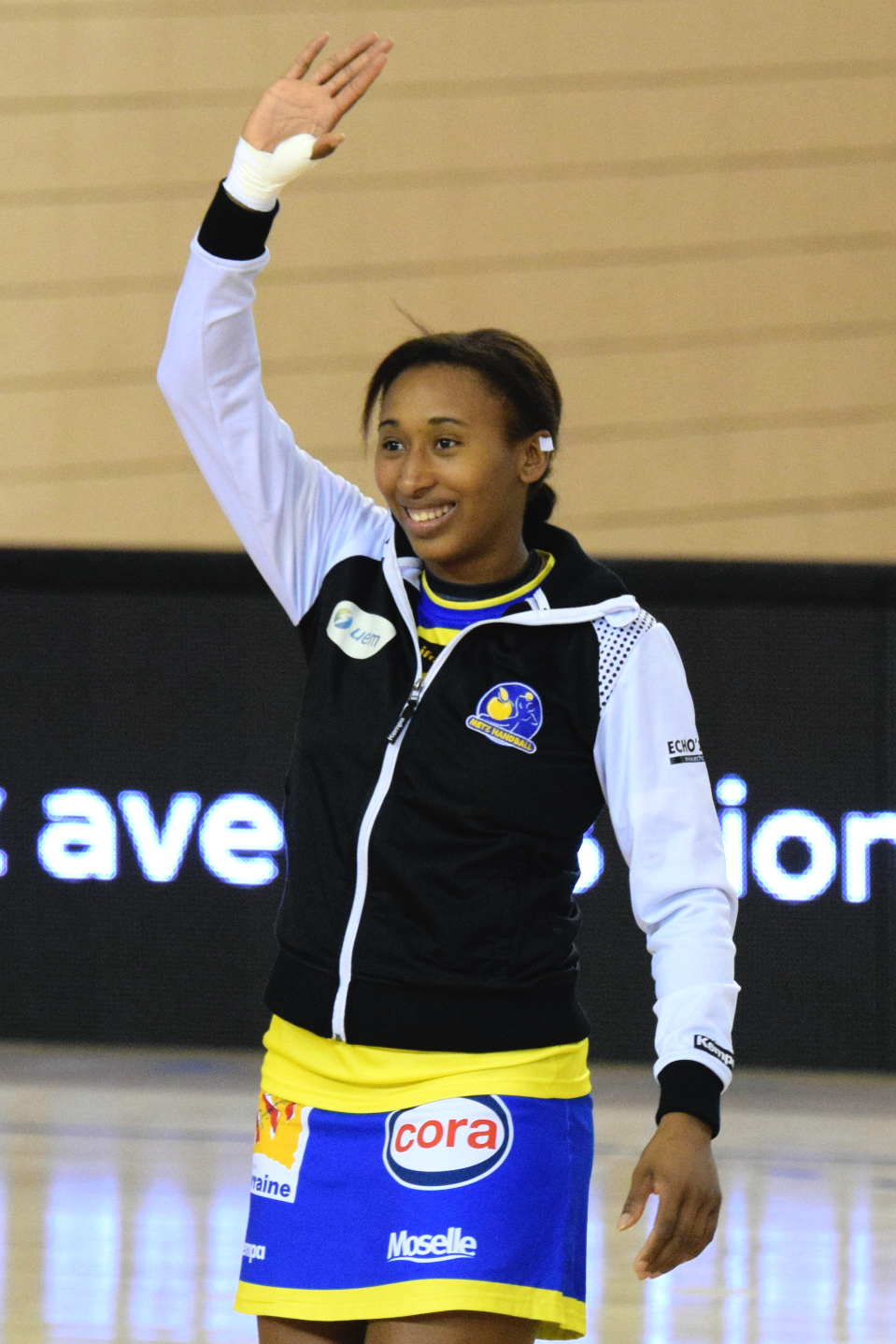 Jurswailly Luciano , le 31 janvier 2016 lors du match Issy Paris Hand / Metz Handball pour le compte de la 14e journée. Au stade Robert Carpentier à Issy-les-moulineaux.